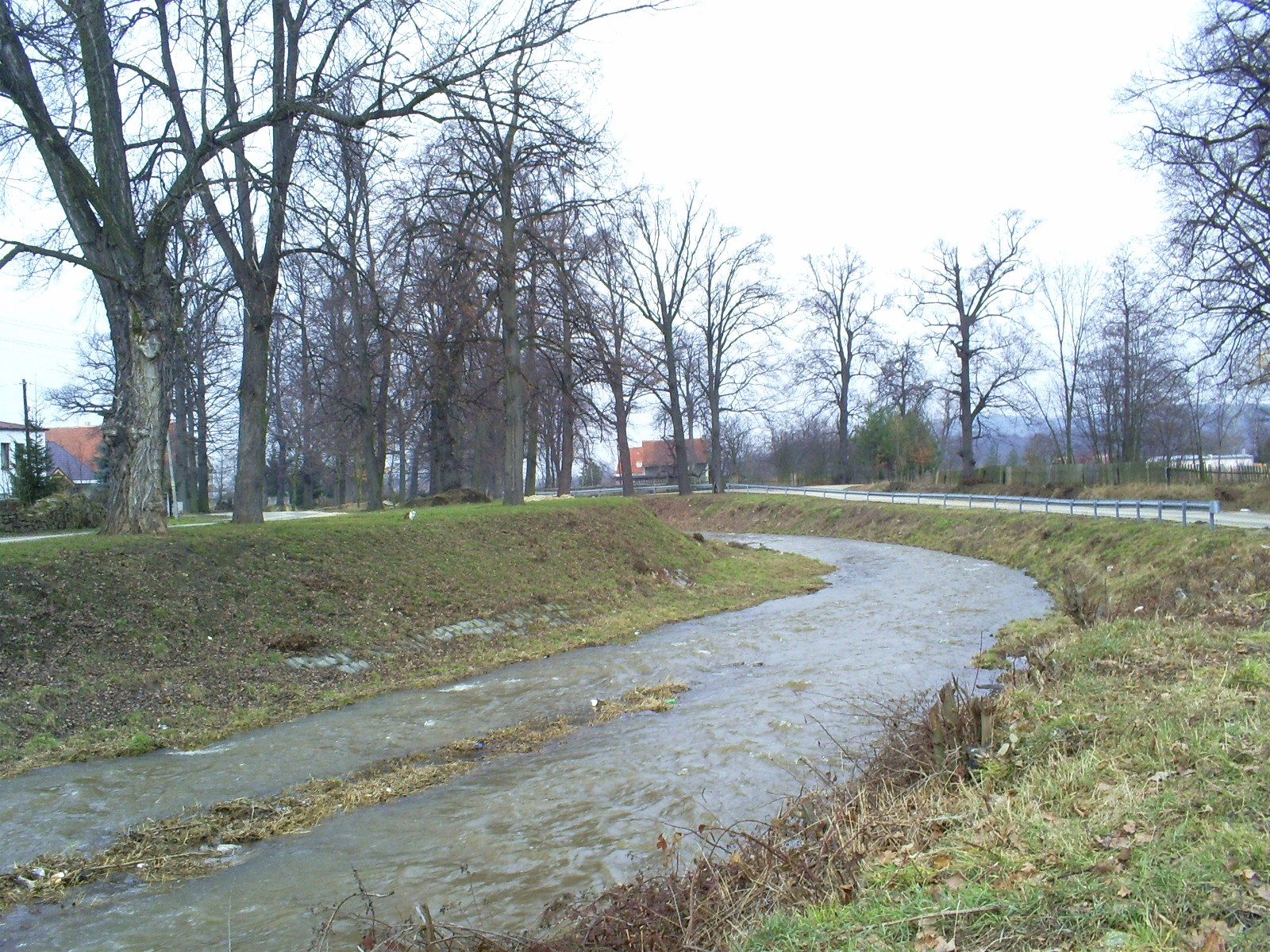 Górny bieg Nysy na południe od Jawora, zmierzający w kierunku miasta